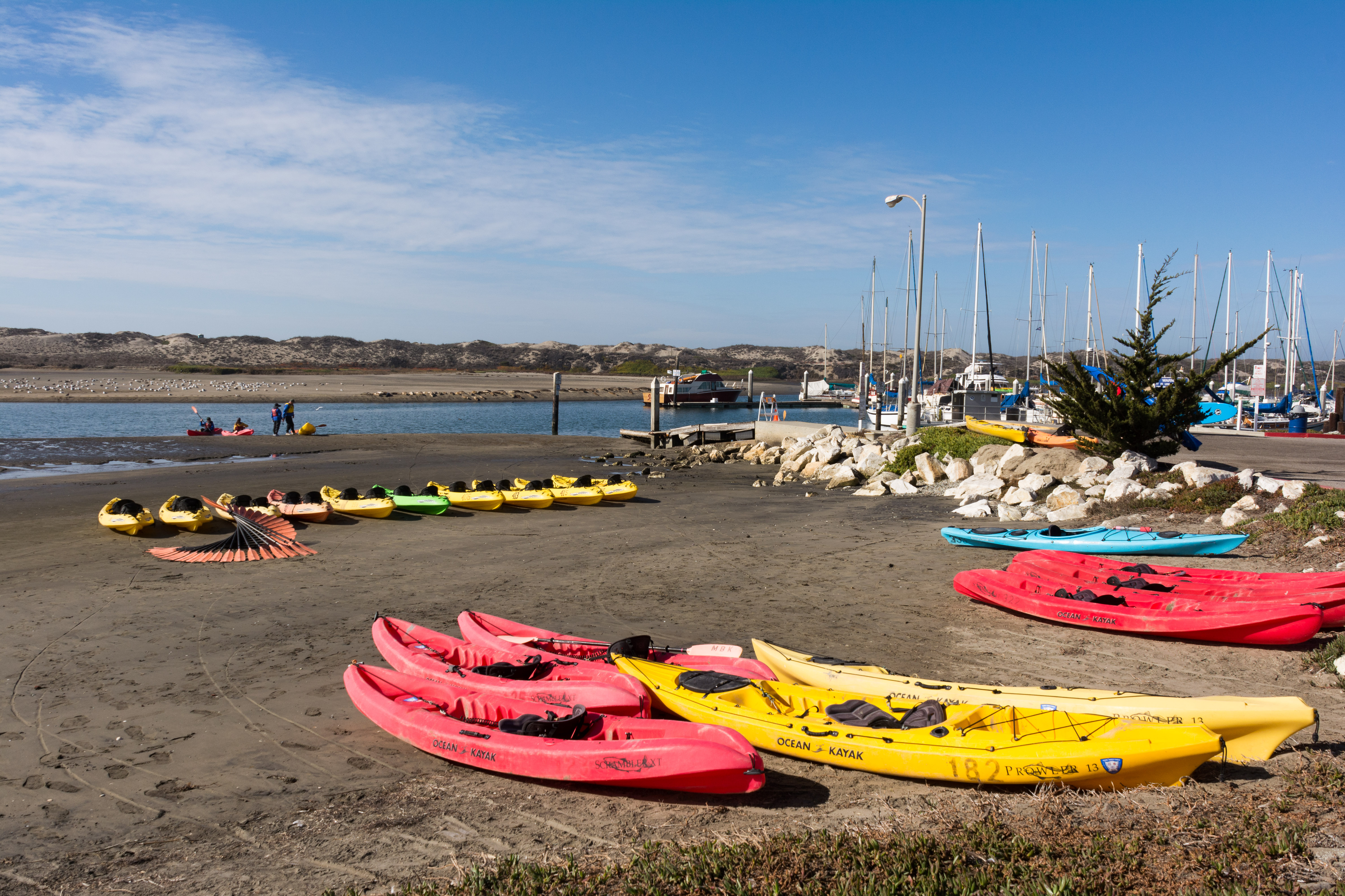 Kayaks at Moss Landing, California.